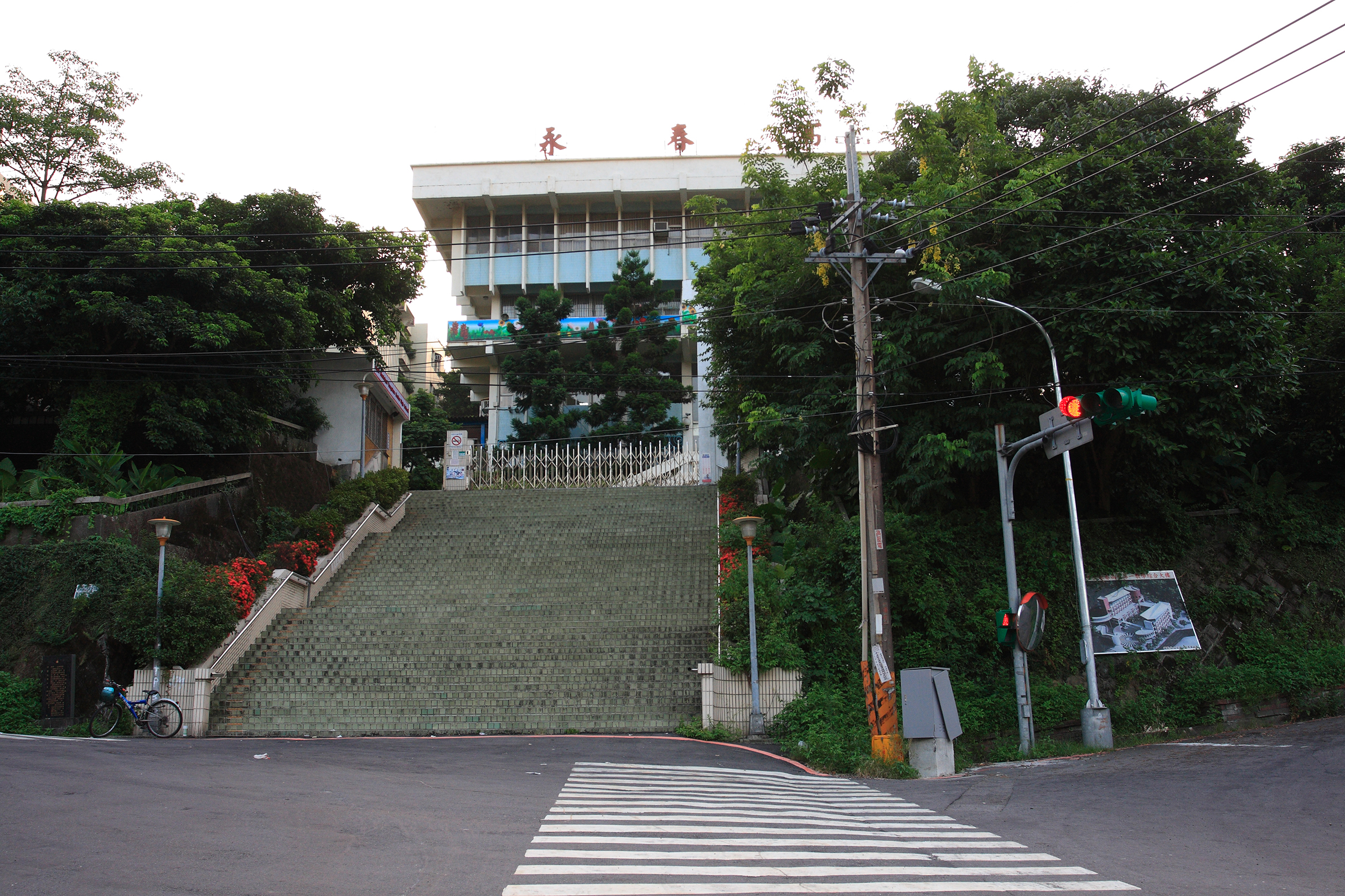 臺北市立永春高級中學大門。